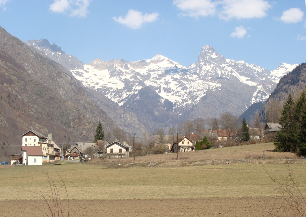 Le hameau du Séchier, commune de Saint-Jacques-en-Valgodemard. A l'arrière-plan, le massif de l'Olan.